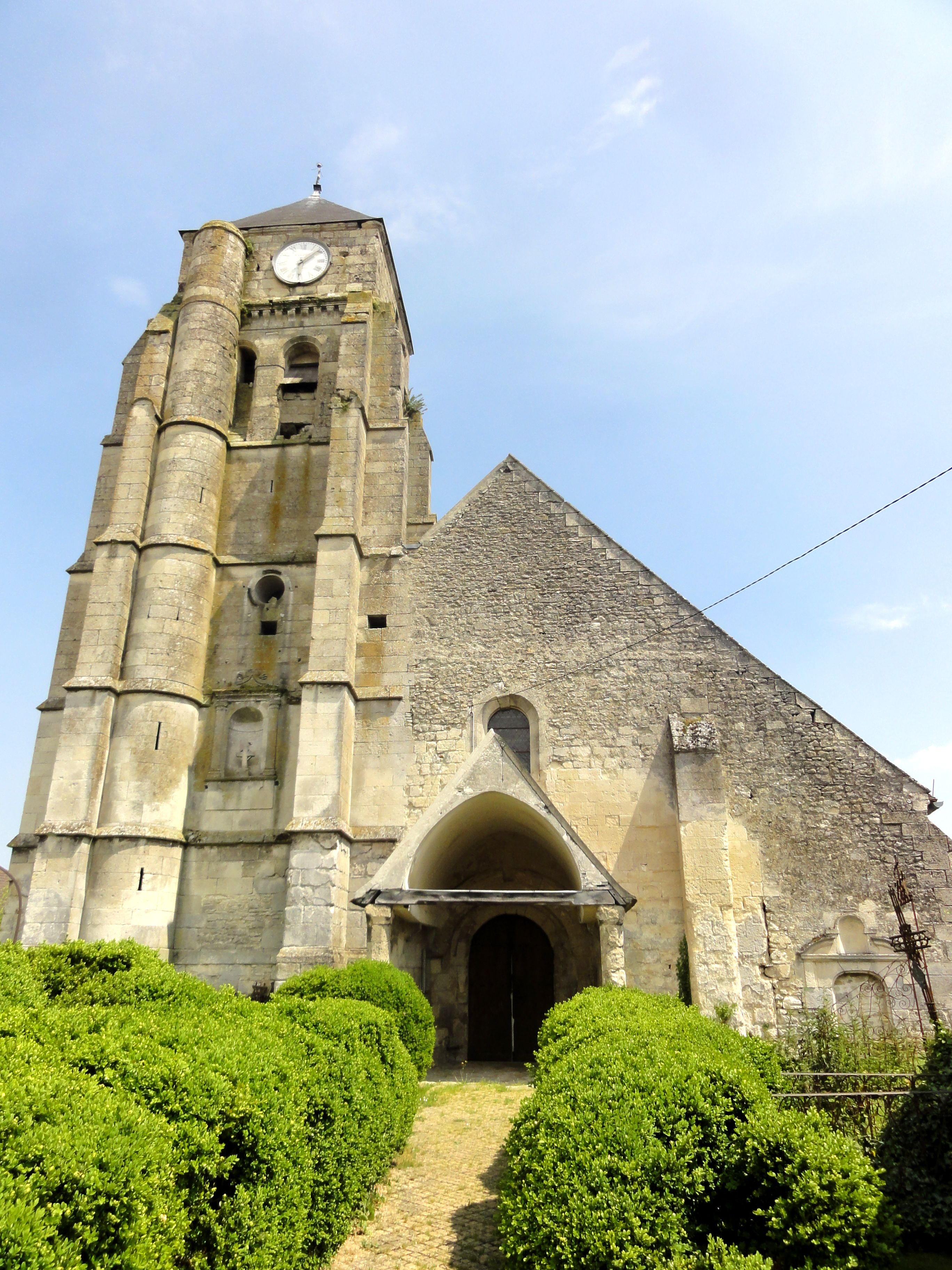 Façade occidentale.